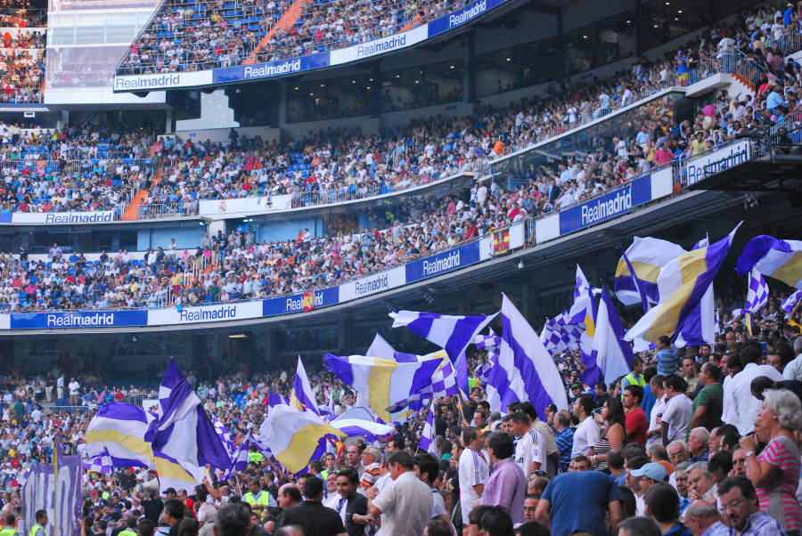 Real Madrid 3-Depor 2 , 29-8-09